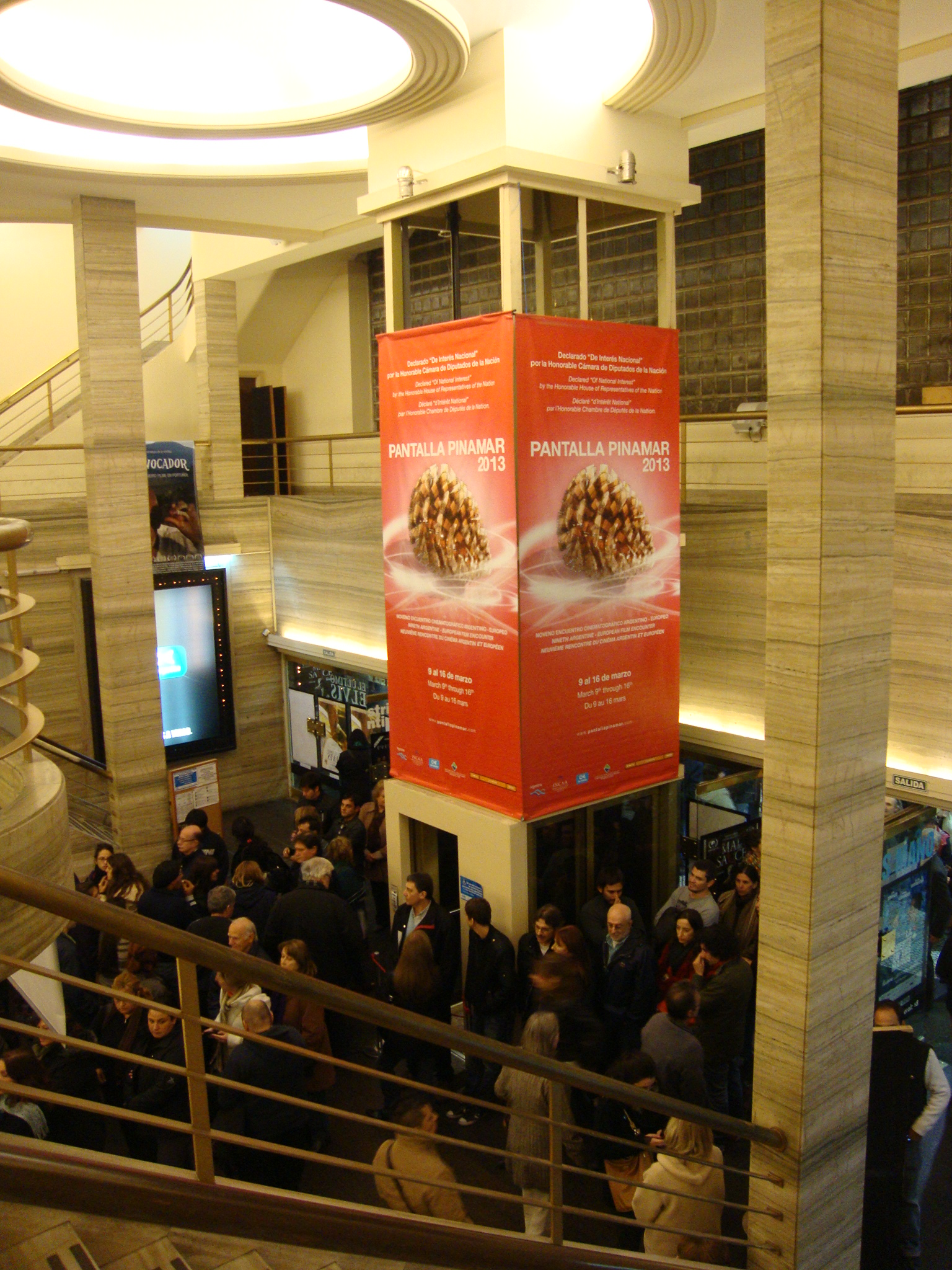 Hall de entrada al Cine Gaumont, en Buenos Aires.